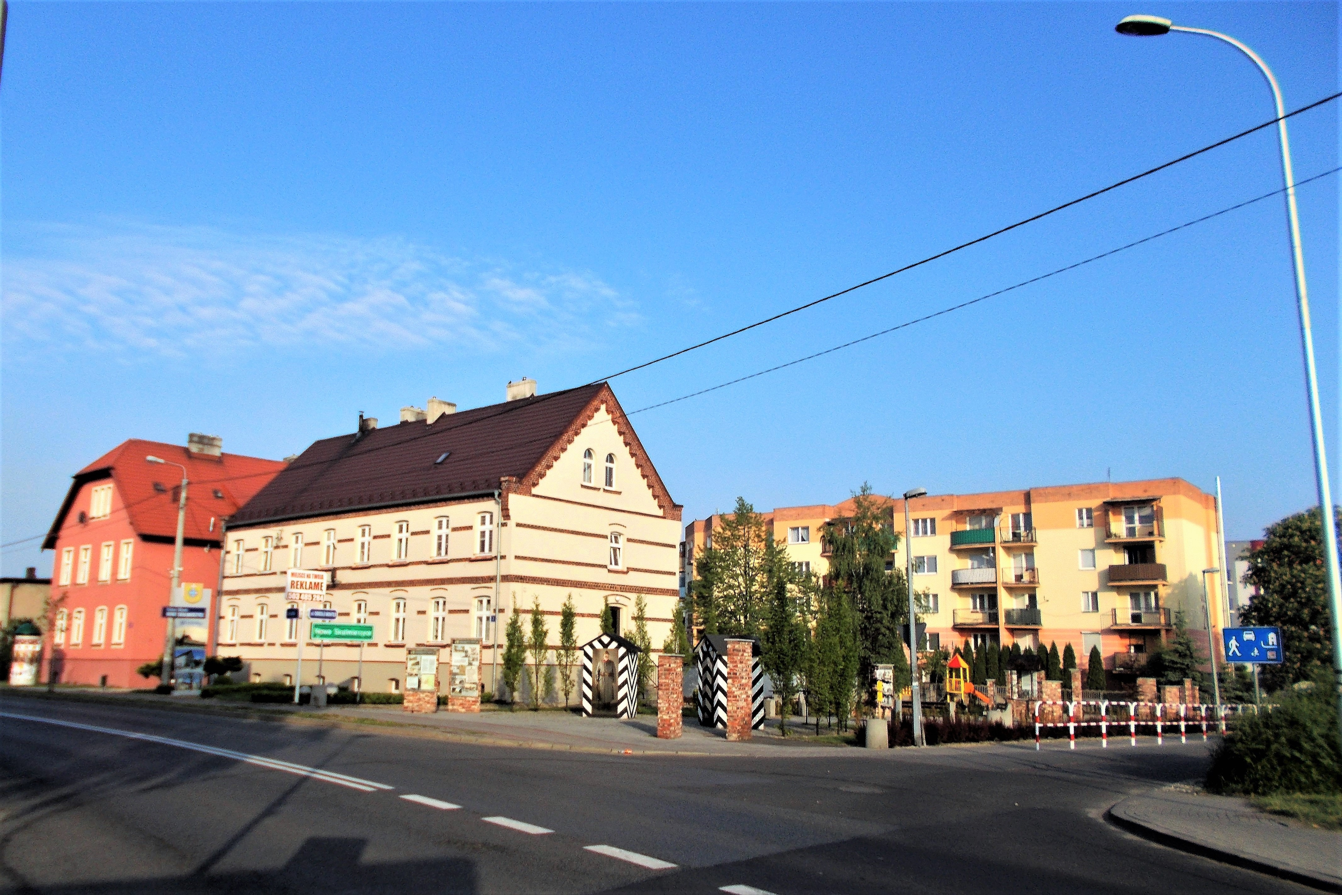 Nowe Skalmierzyce, osiedle Montex